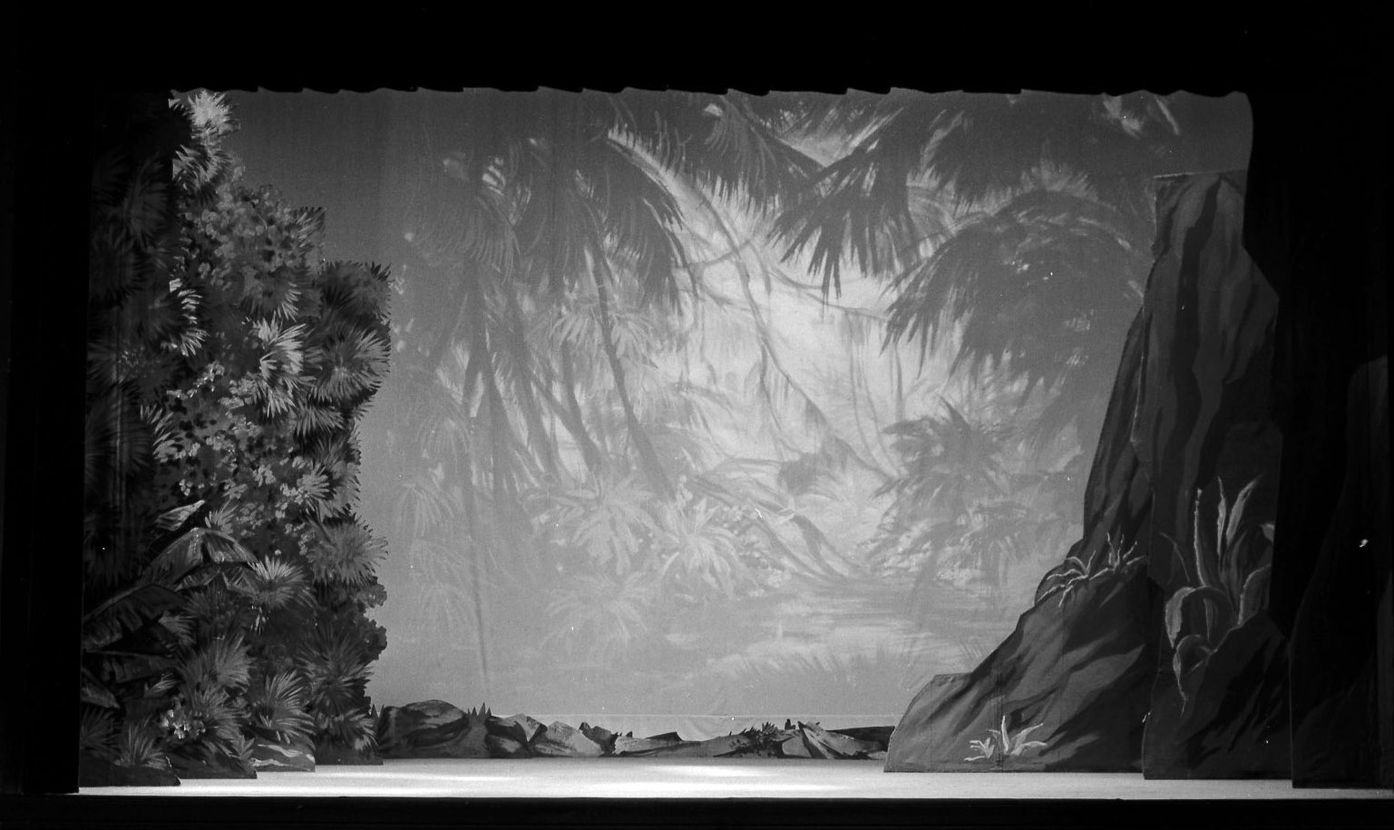 Théâtre du Capitole. Le 1 Mars 1968. Vue des décors des Pêcheurs de perles au théâtre du Capitole.